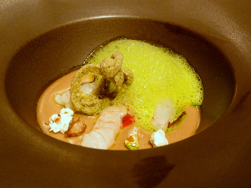 Velouté de cigalas con tomate y alga